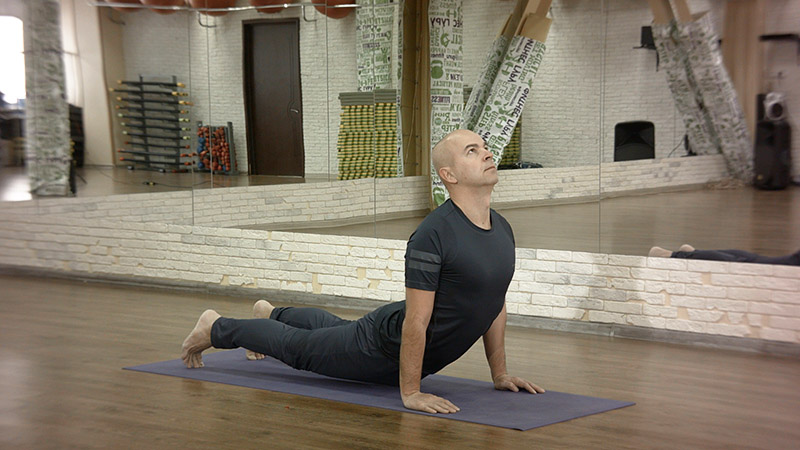 Бхуджангасана в составе комплекса Сурья Намаскар. Выполняет Сергей Замковой